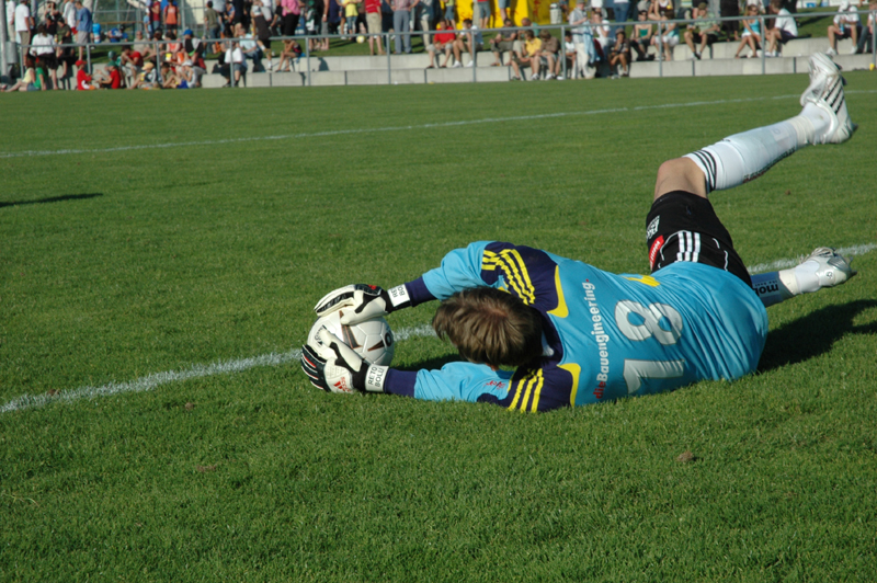 Reto Bolli im Sommer 2008 (Testspiel gegen FC Vaduz)